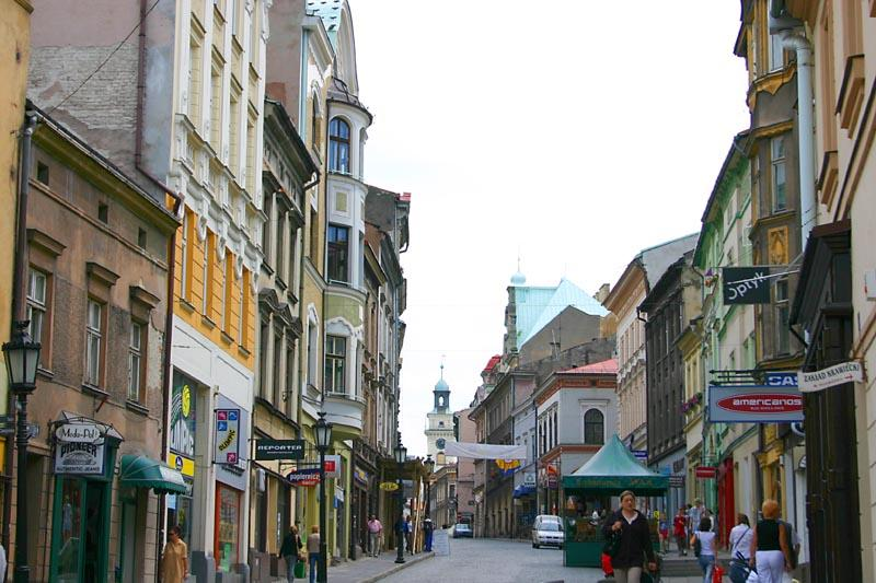 Cieszyn (Poland)